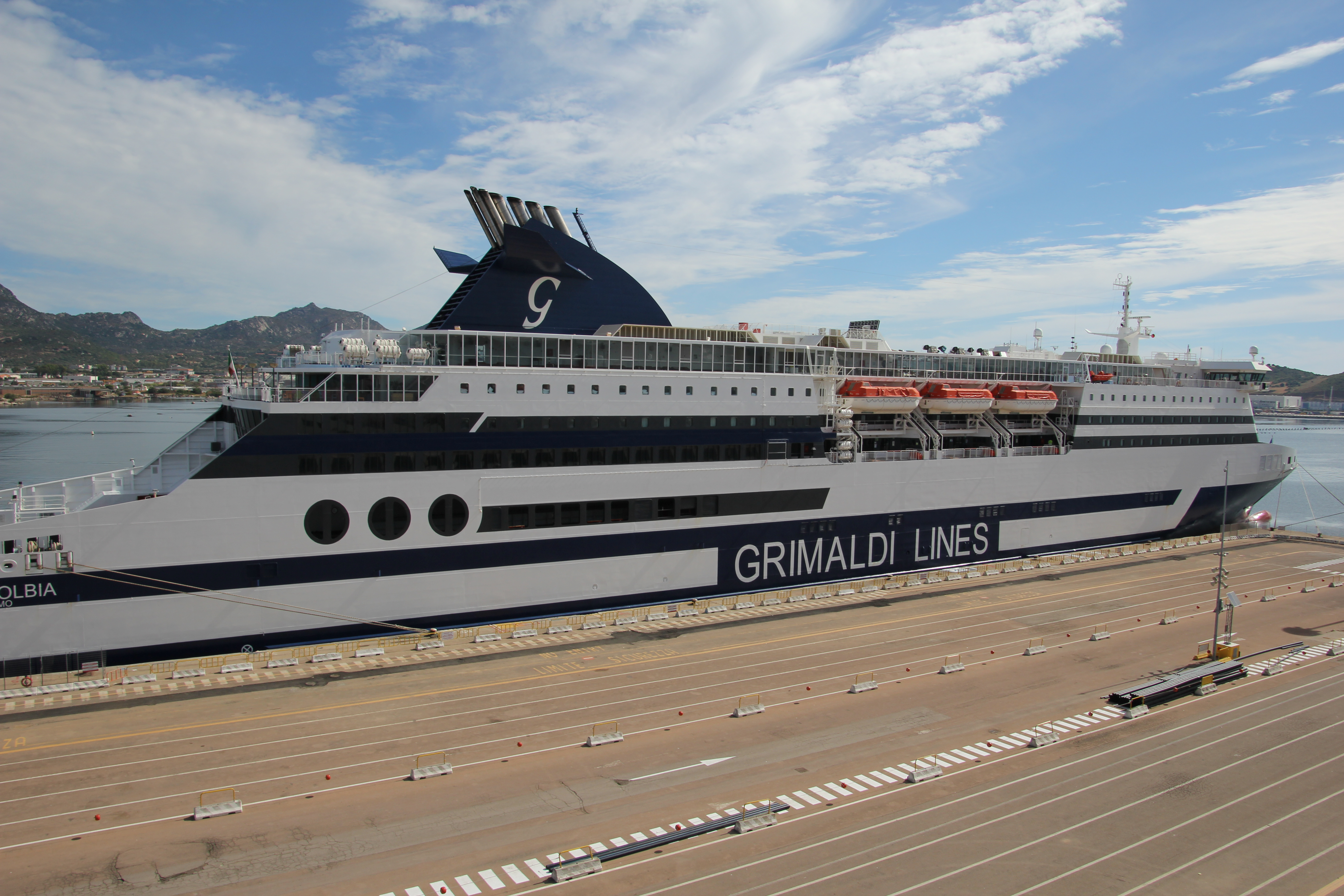 Grimaldi Ferries, nave Cruise Olbia